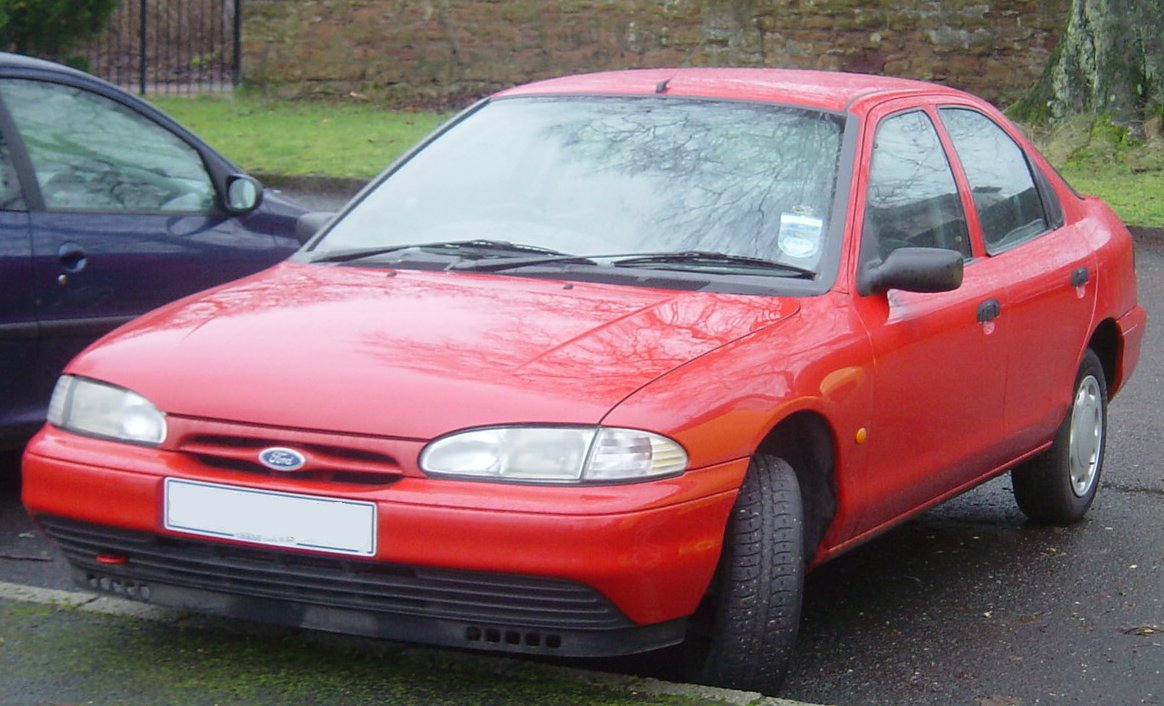 Ford Mondeo Mk I Liftback(MY1993 - 1996)